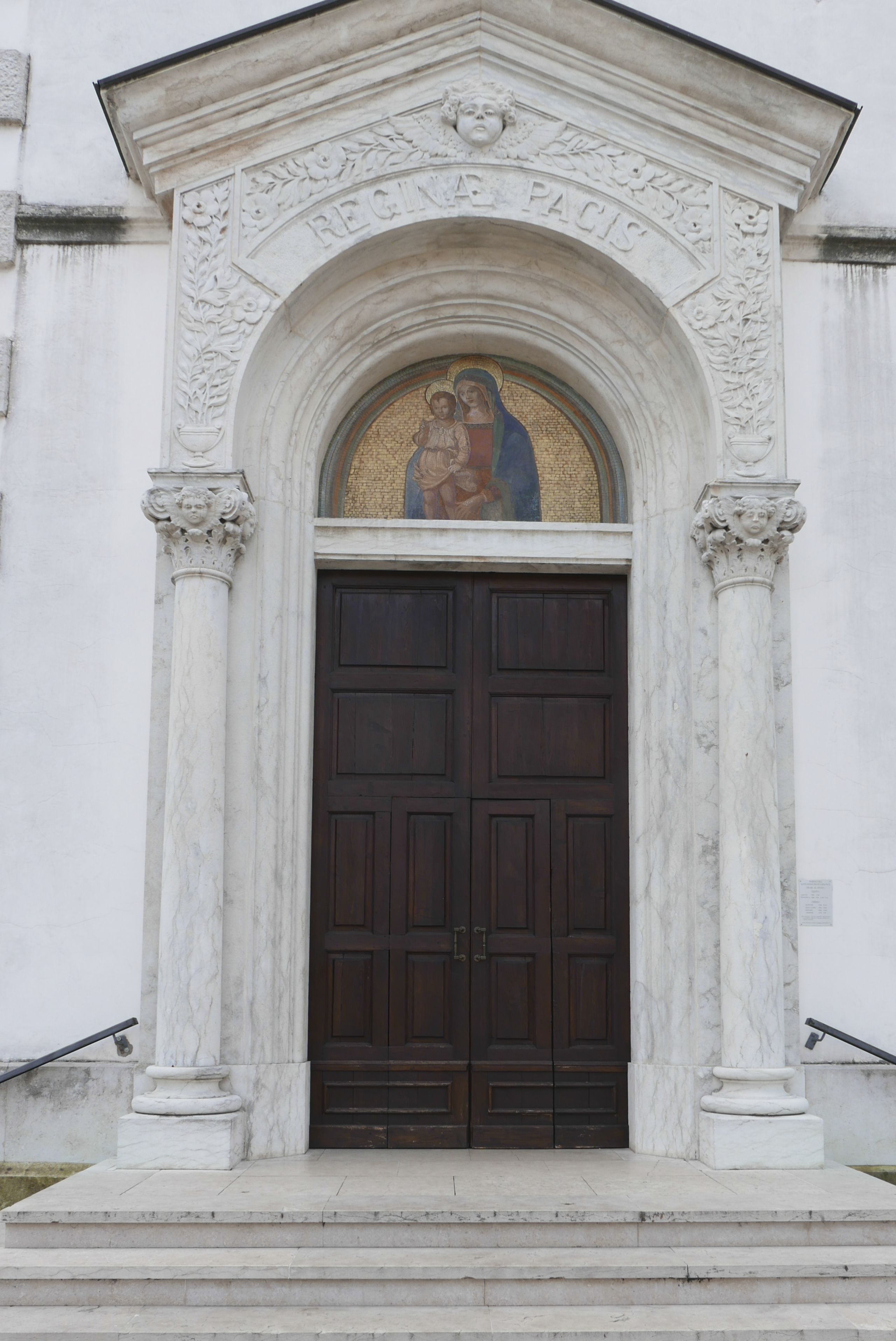 Vicenza - Chiesa della Madonna della Pace, nel quartiere Stanga